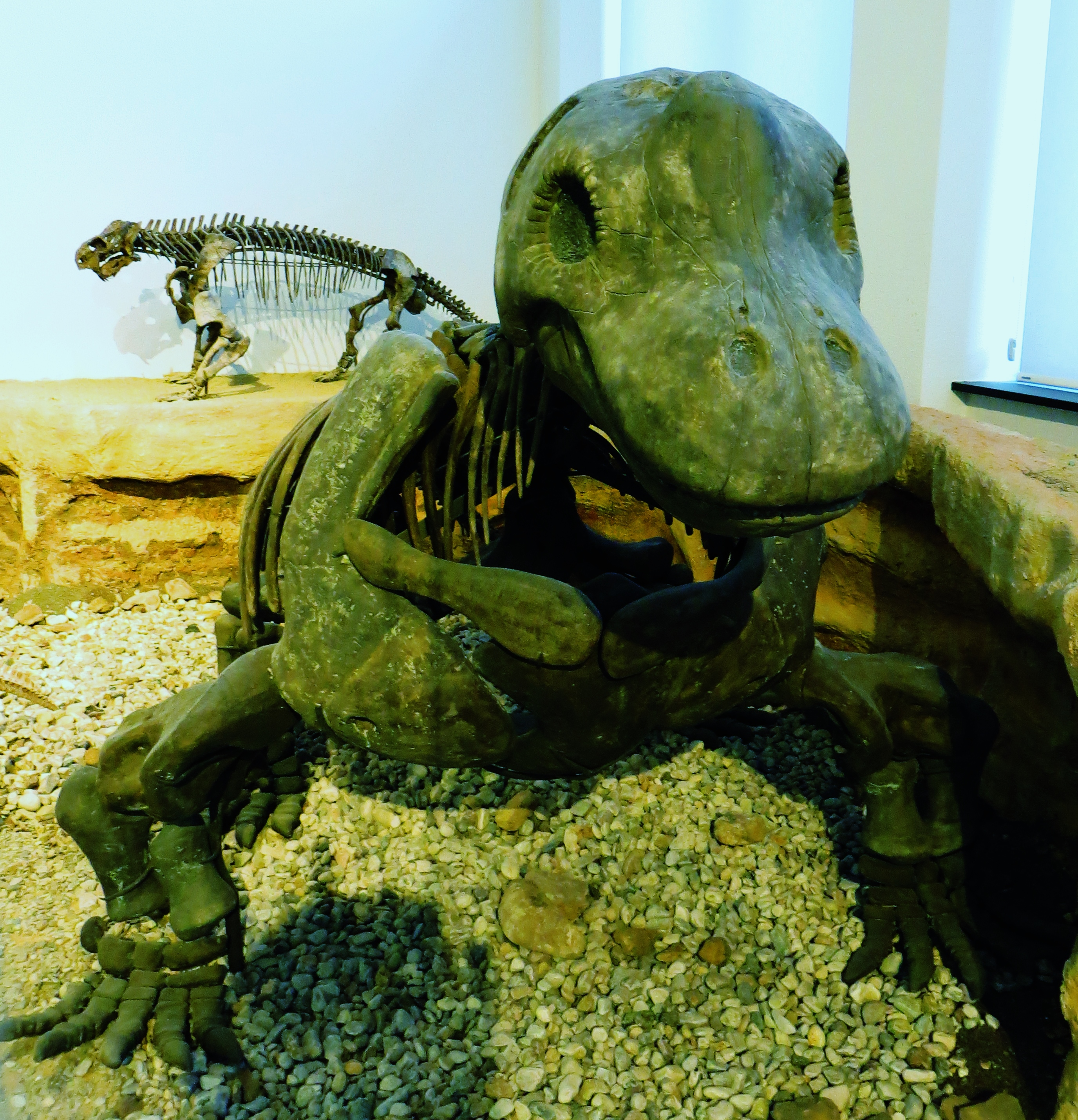 Fossil of Keratocephalus, an extinct therapsid - Took the picture at Museum of Paleontology, Tuebingen